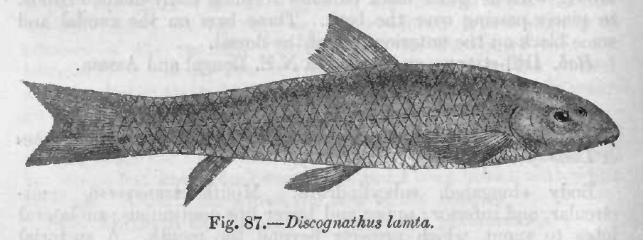 Discognathus lamta = Garra lamta (Hamilton, 1822)